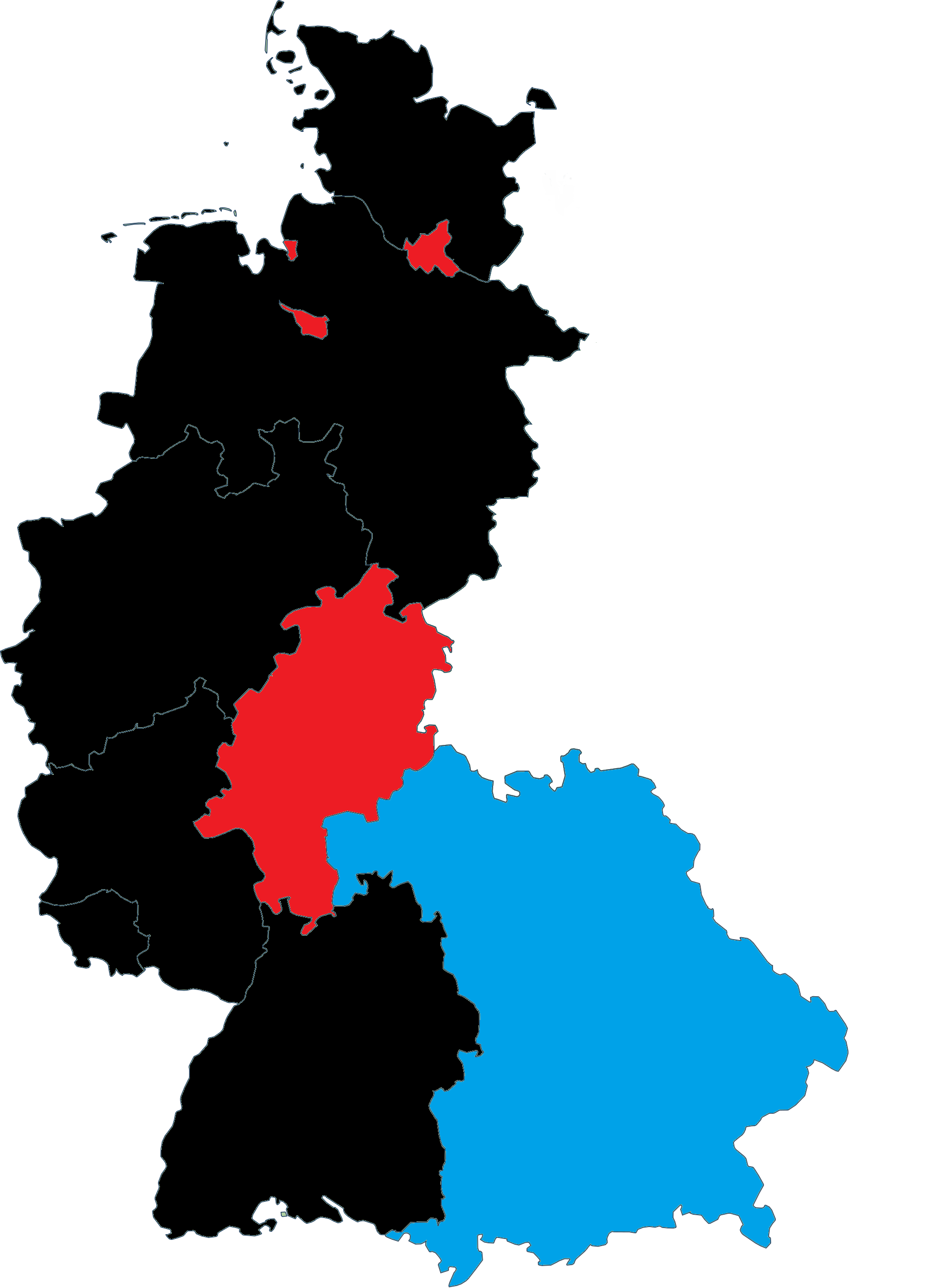 Elections européennes de 1979 en Allemagne, parti arrivé en tête par Land. Rouge : SPD Noir : CDU Bleu : CSU